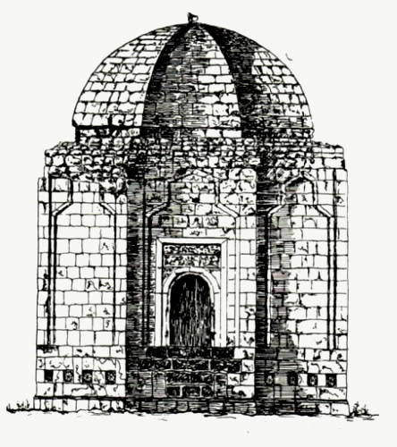 Şeyx Babı türbəsinin bərpa olunmuş görünüşü